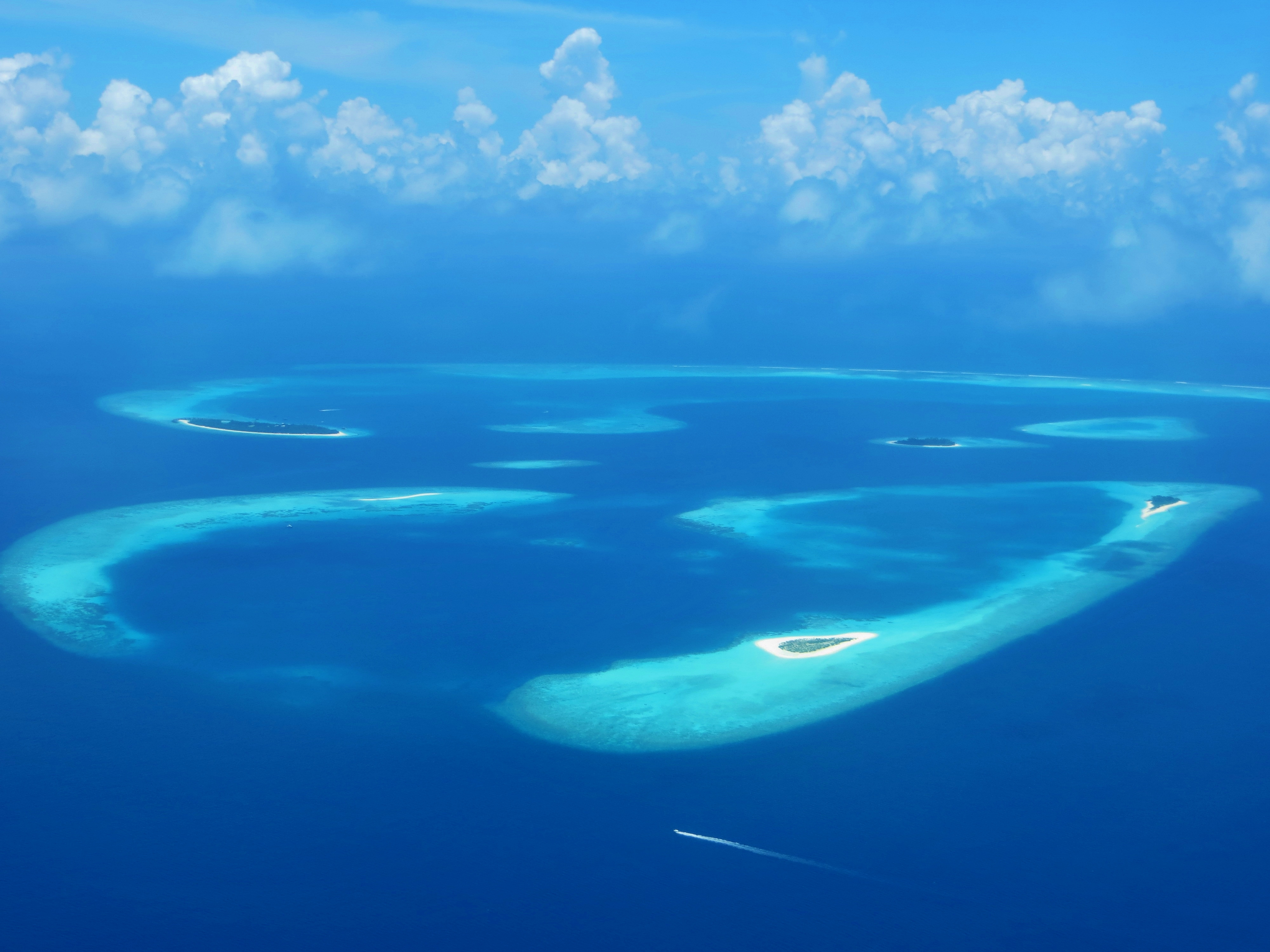 Une vue aérienne de Veyofushi dans l'atoll de Baa, aux Maldives.